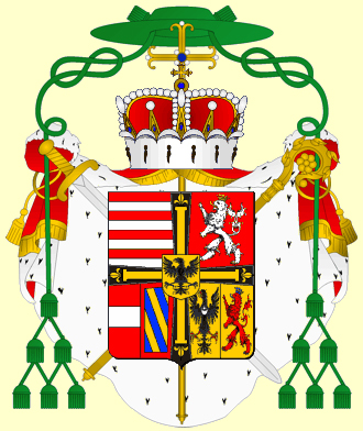 Герб Великого магистра Тевтонского ордена Карла Йозефа Австрийского (1649-1664)